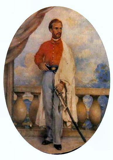 Ritratto di Biagio Caranti in divisa garibaldina